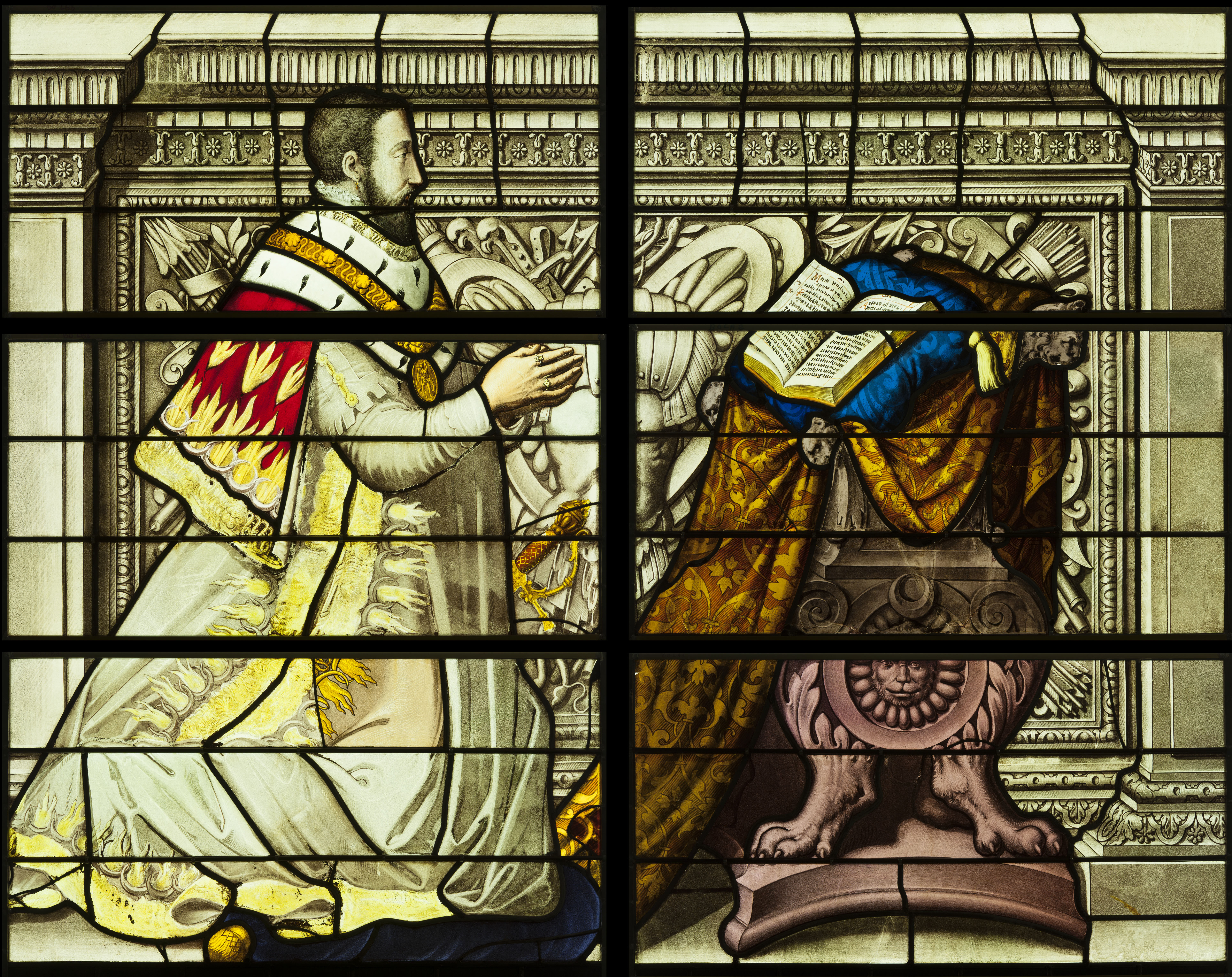 Montage présentant le soubassement de la verrière centrale (baie 0) de l'abside.